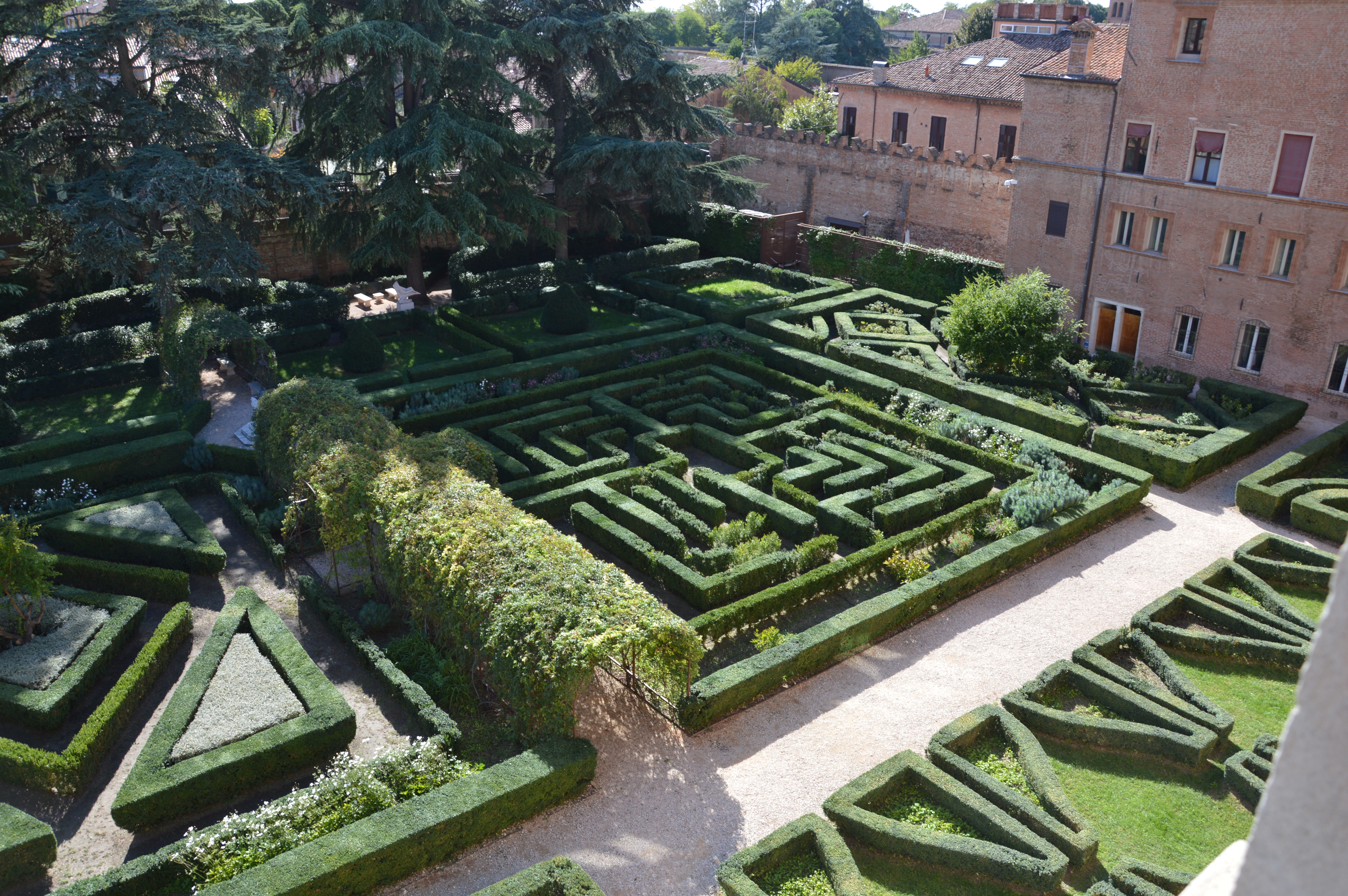 Palazzo Costabili This is a photo of a monument which is part of cultural heritage of Italy.